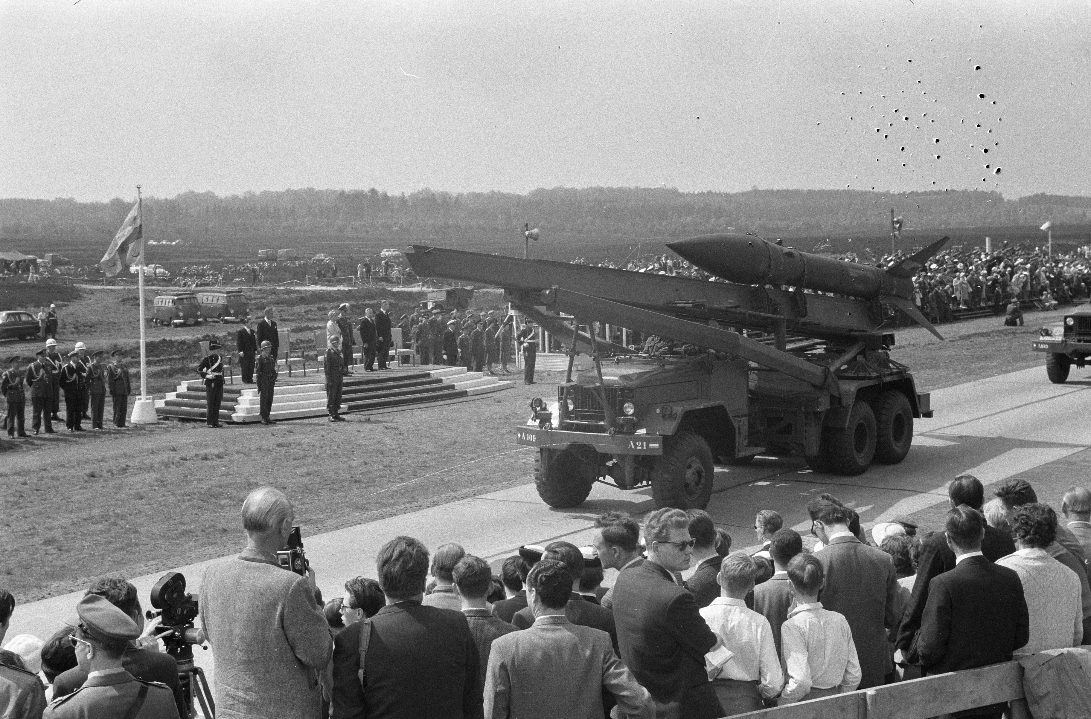 Collectie / Archief : Fotocollectie Anefo Reportage / Serie : [ onbekend ] Beschrijving : Militaire parade bij Ede voor koningin Juliana en prins Bernhard, raket van het type Honest John Datum : 5 mei 1960 Locatie : Ede, Gelderland Trefwoorden : militaire parades, raketten Fotograaf : Pot, Harry / Anefo Auteursrechthebbende : Nationaal Archief Materiaalsoort : Negatief (zwart/wit) Nummer archiefinventaris : bekijk toegang 2.24.01.05 Bestanddeelnummer : 911-2200